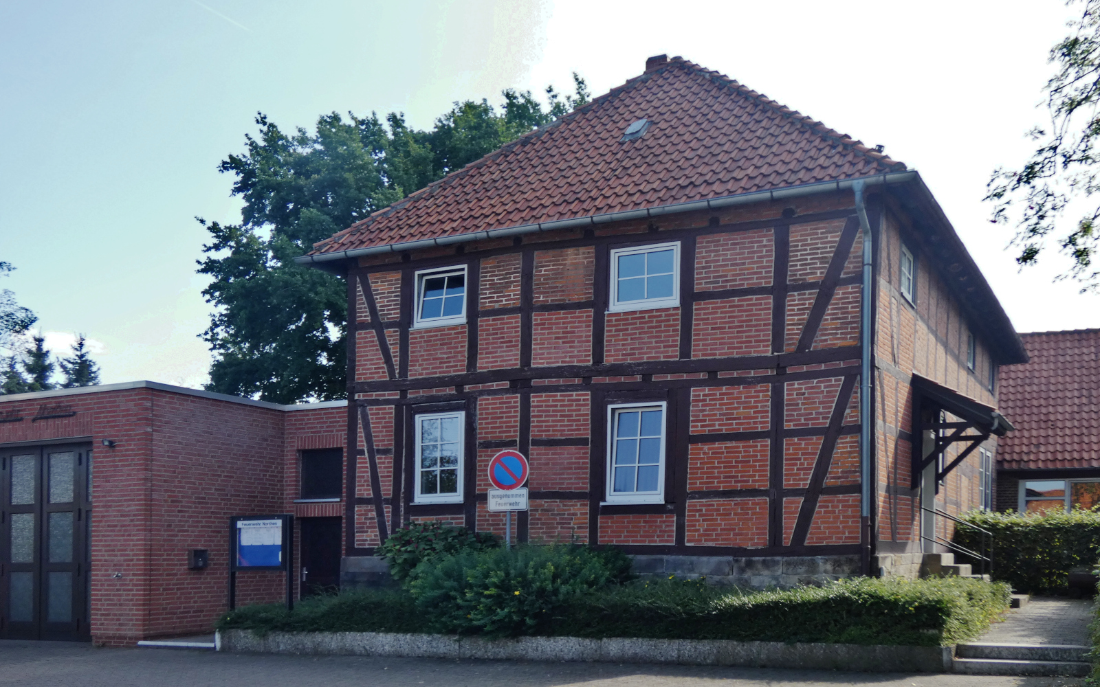 Ehemalige Dorfschule, heute durch die Ortsfeuerwehr genutzt. Zweistöckig abgezimmertes Fachwerkgebäude aus dem späten 19. Jahrhundert. Fast quadratischer Grundriss mit niedrigem Oberstock unter einem Walmdach.